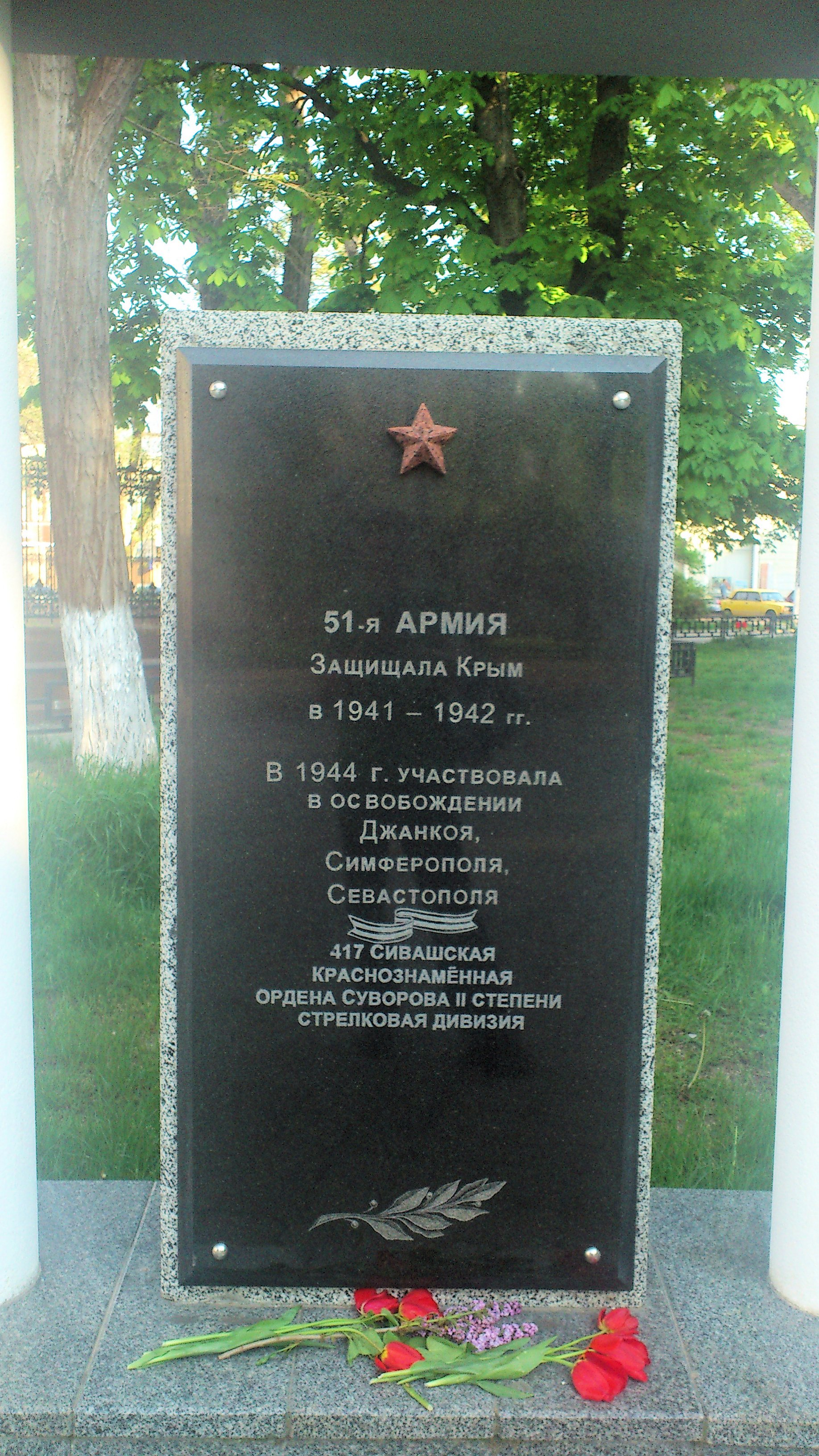 Надпись на плите: "4-й Украинский фронт под командованием генерала армии Ф. И. Толбухина участвовал в Крымской наступательной операции 1944 г."